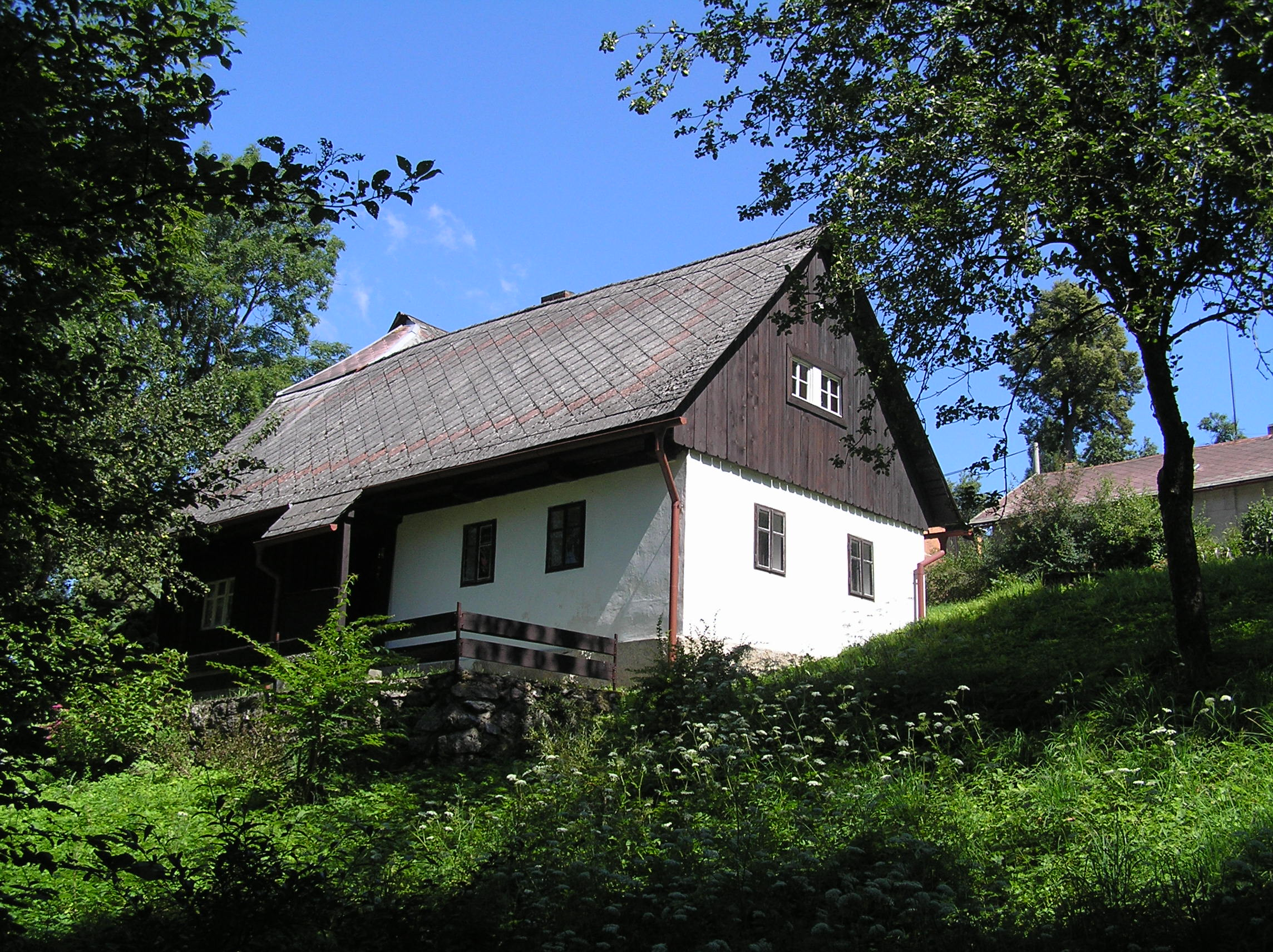 Starý Dub - chalupa čp. 22